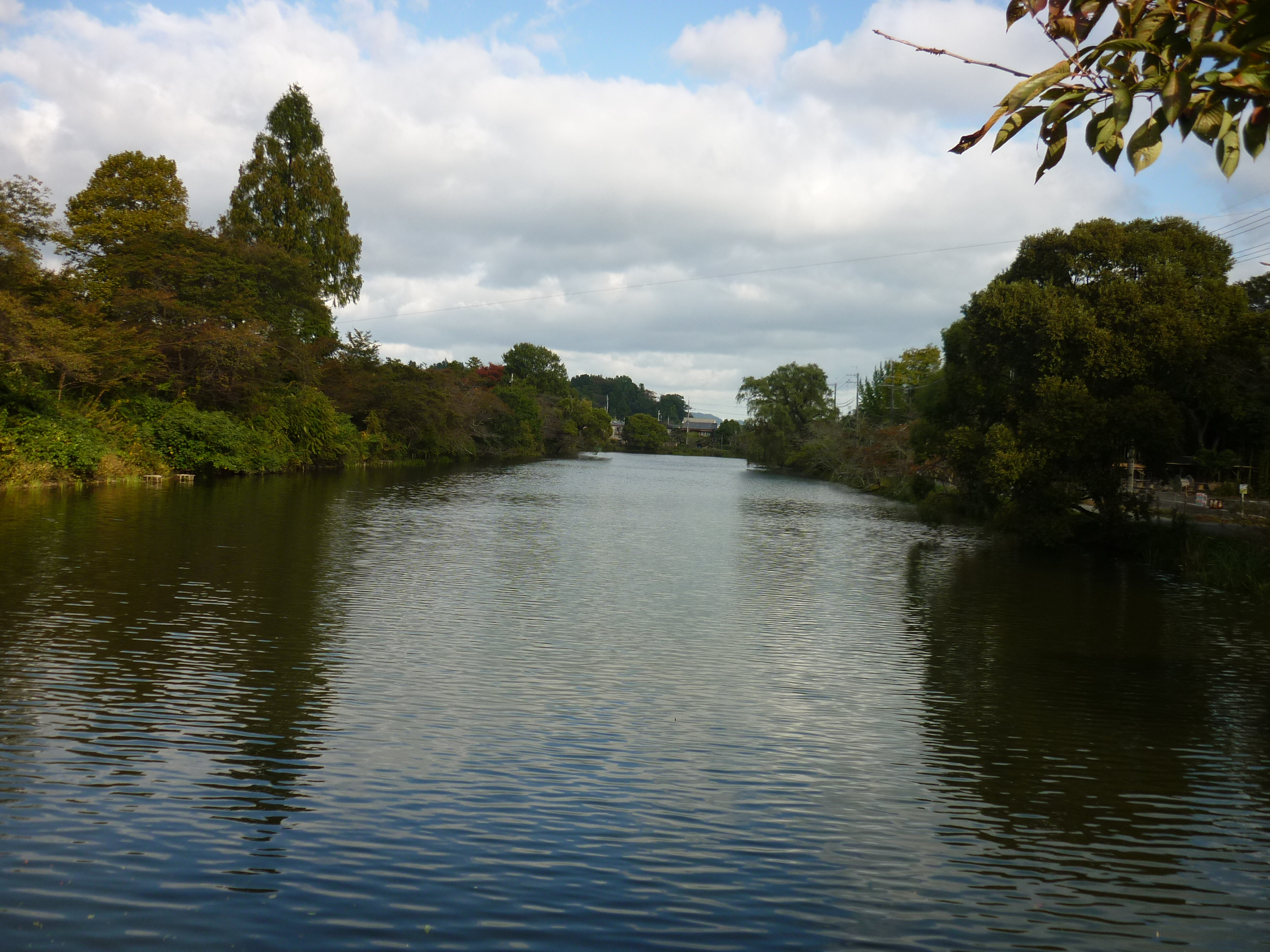 南門周辺外堀